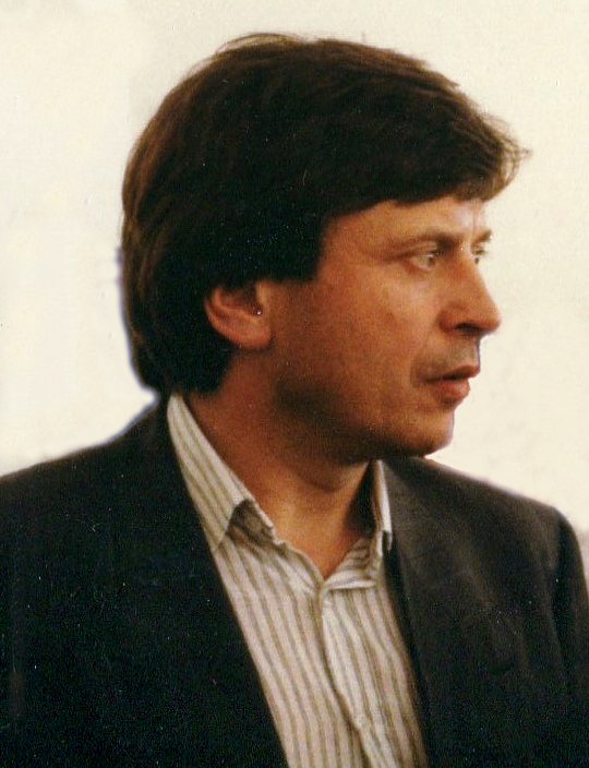 Porträt Heinz Glässgen, ehemaliger Intendant Radio Bremen, Katholik